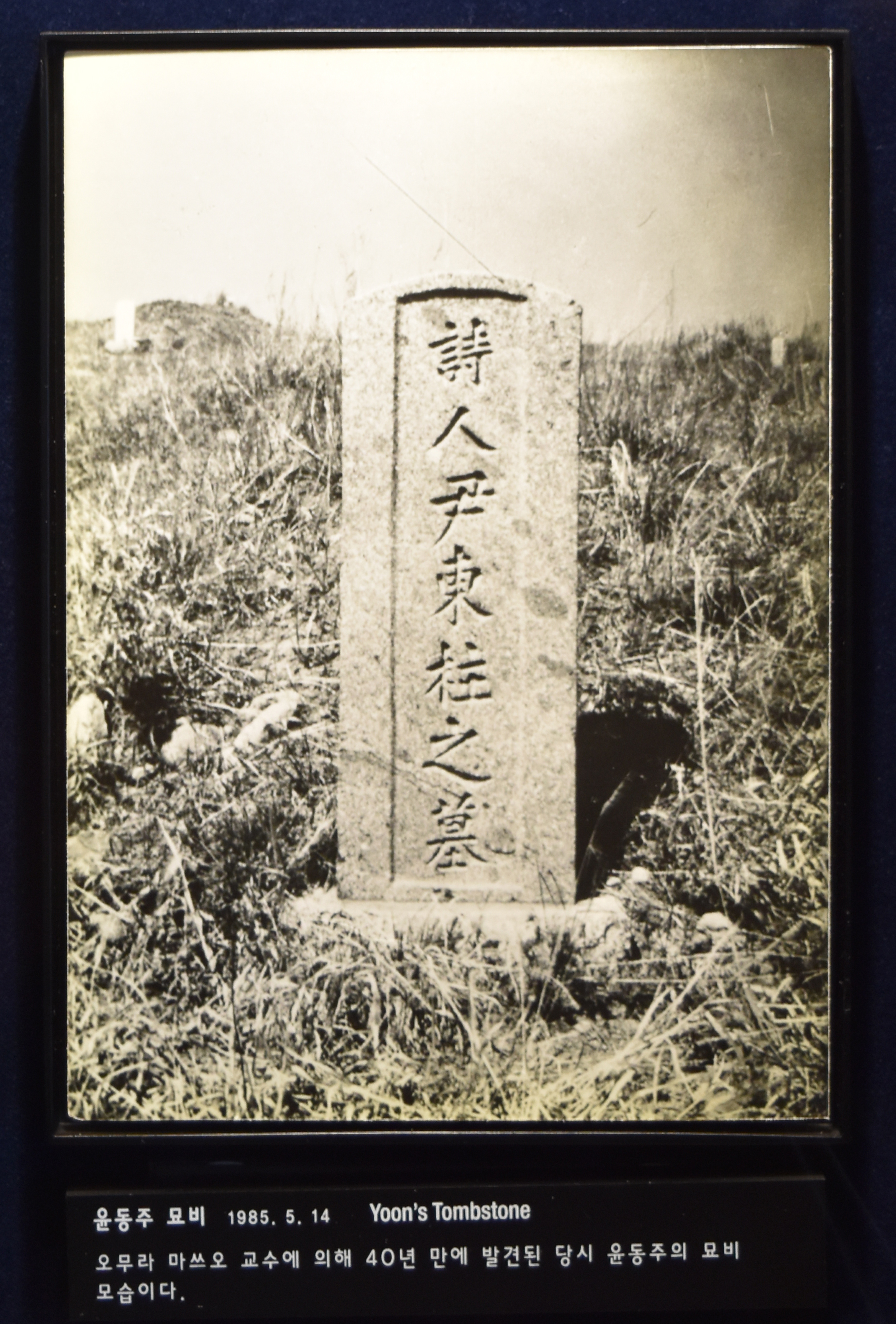 윤동주 문학관에 전시된 묘비 사진